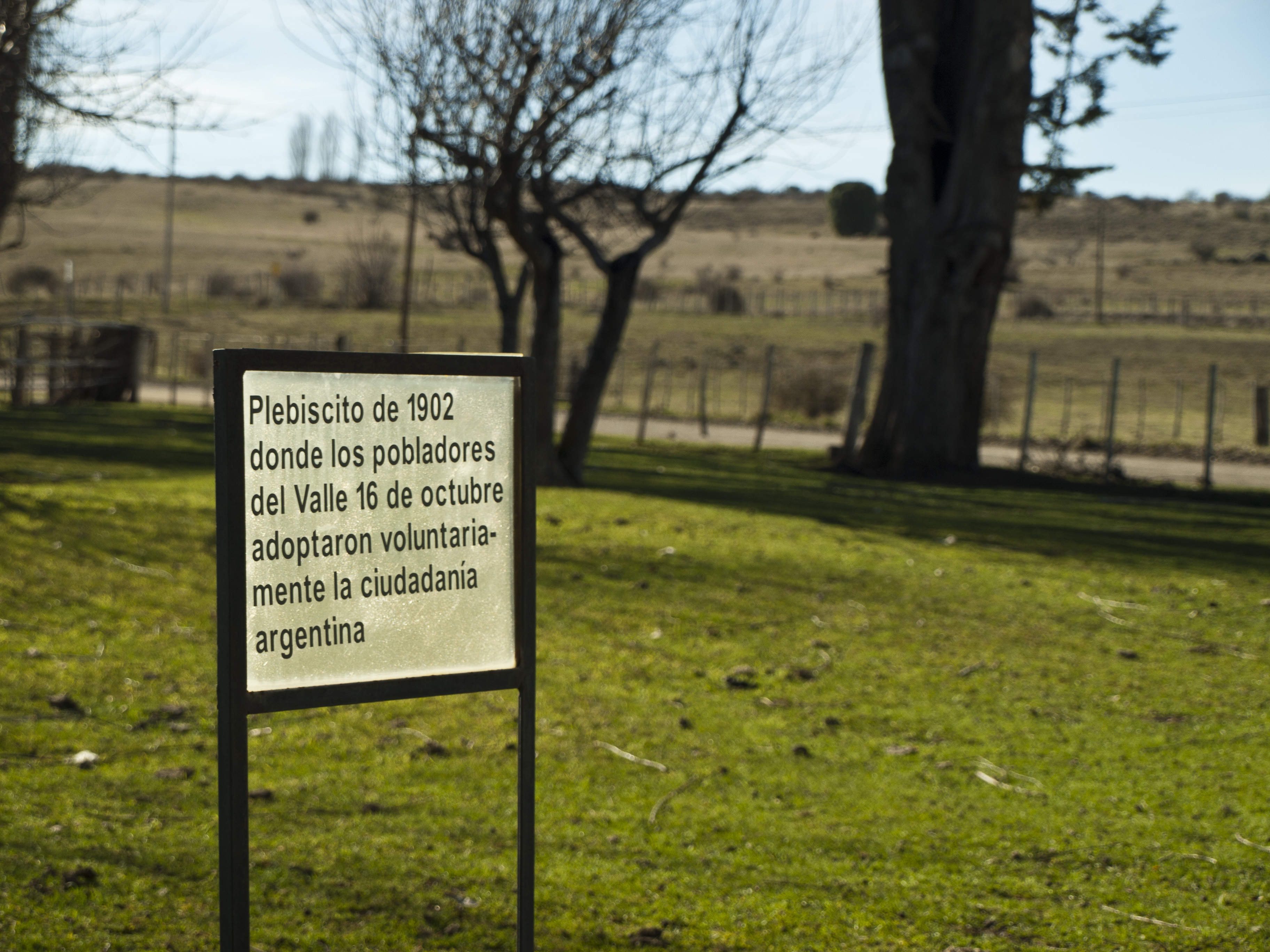 Alrededor de la escuela hay distintos artefactos y elementos historicos y una pequeña reseña por su caracter de Monumento Historico